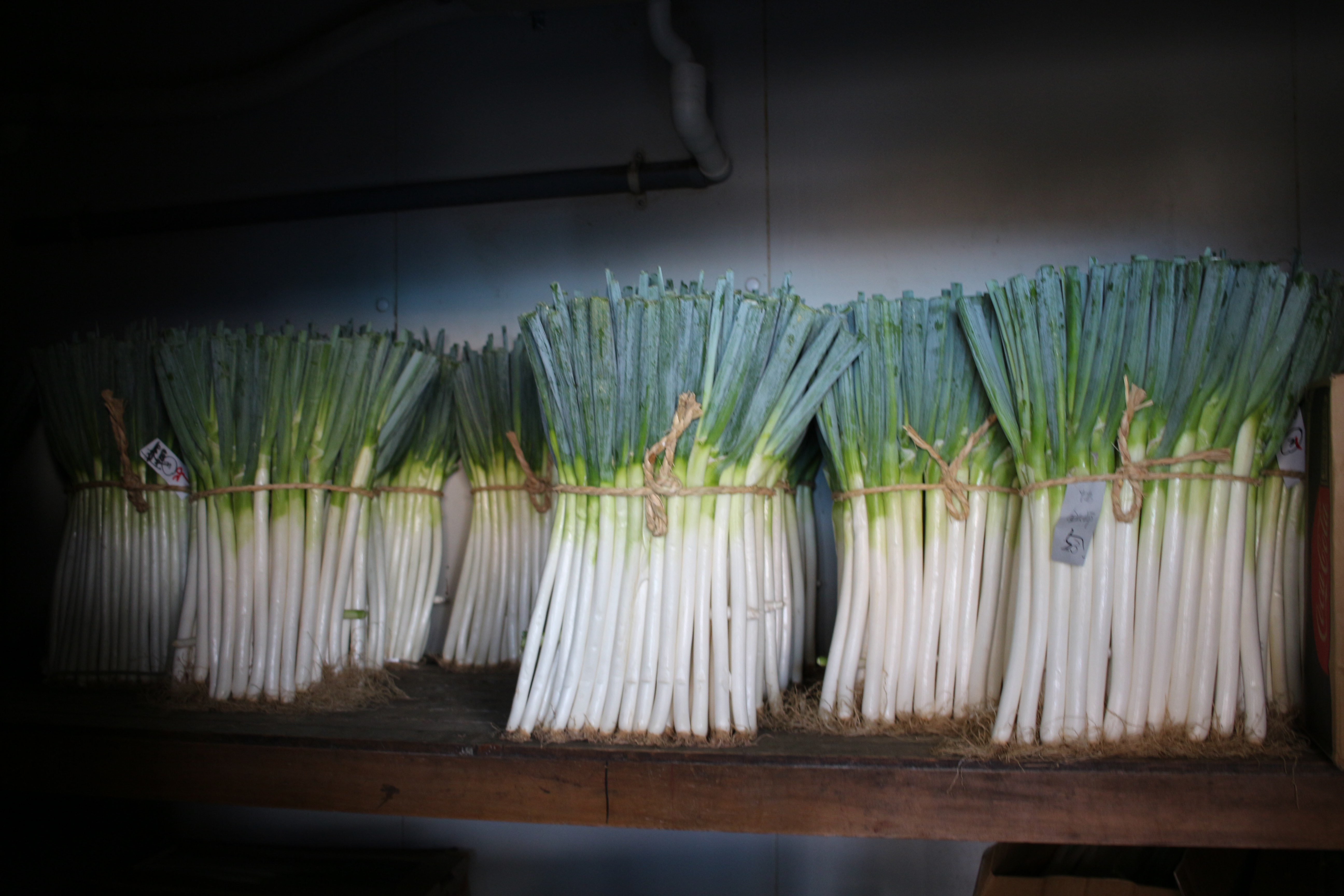 東京都足立区 千寿葱